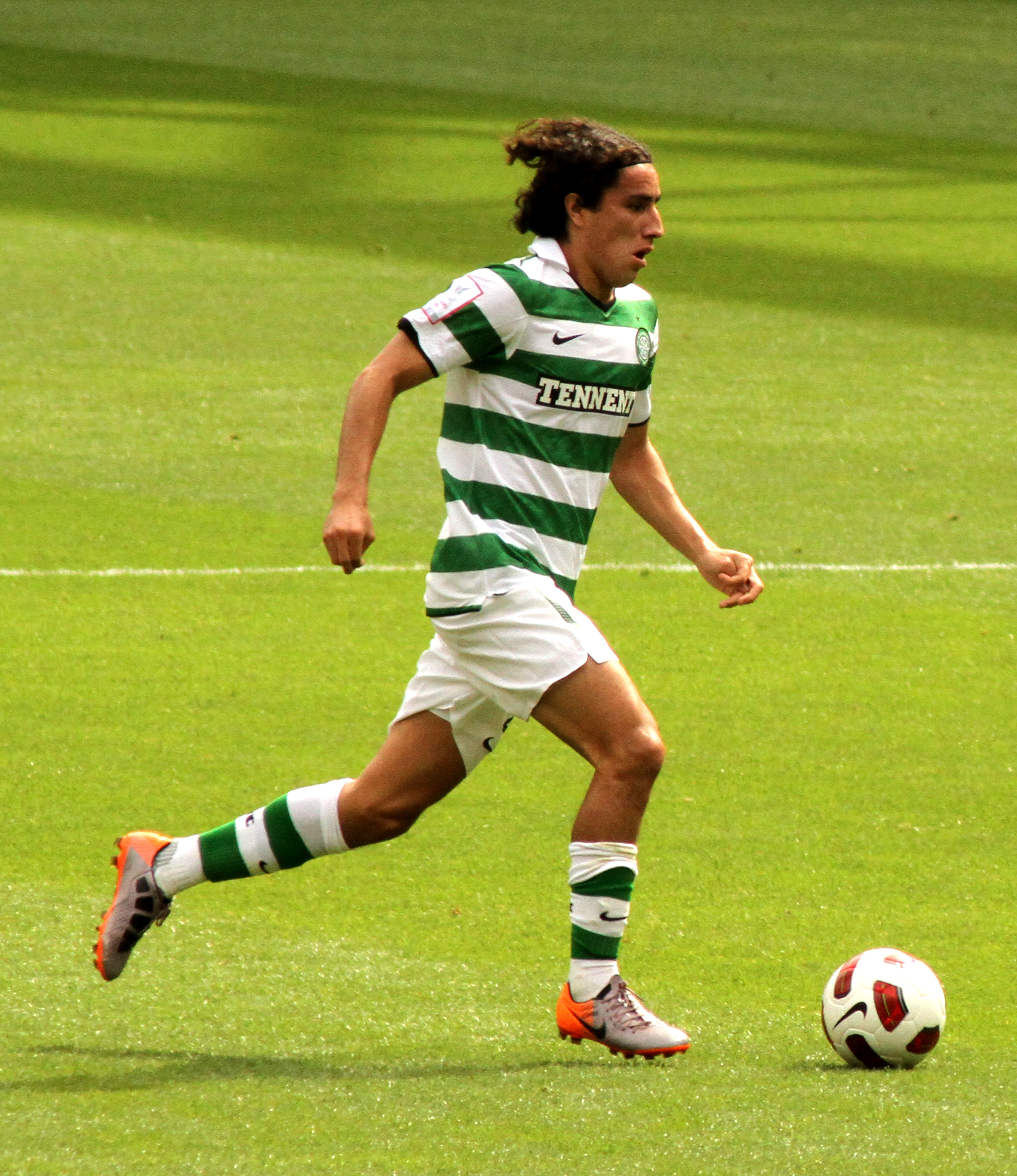 Efrain Juarez